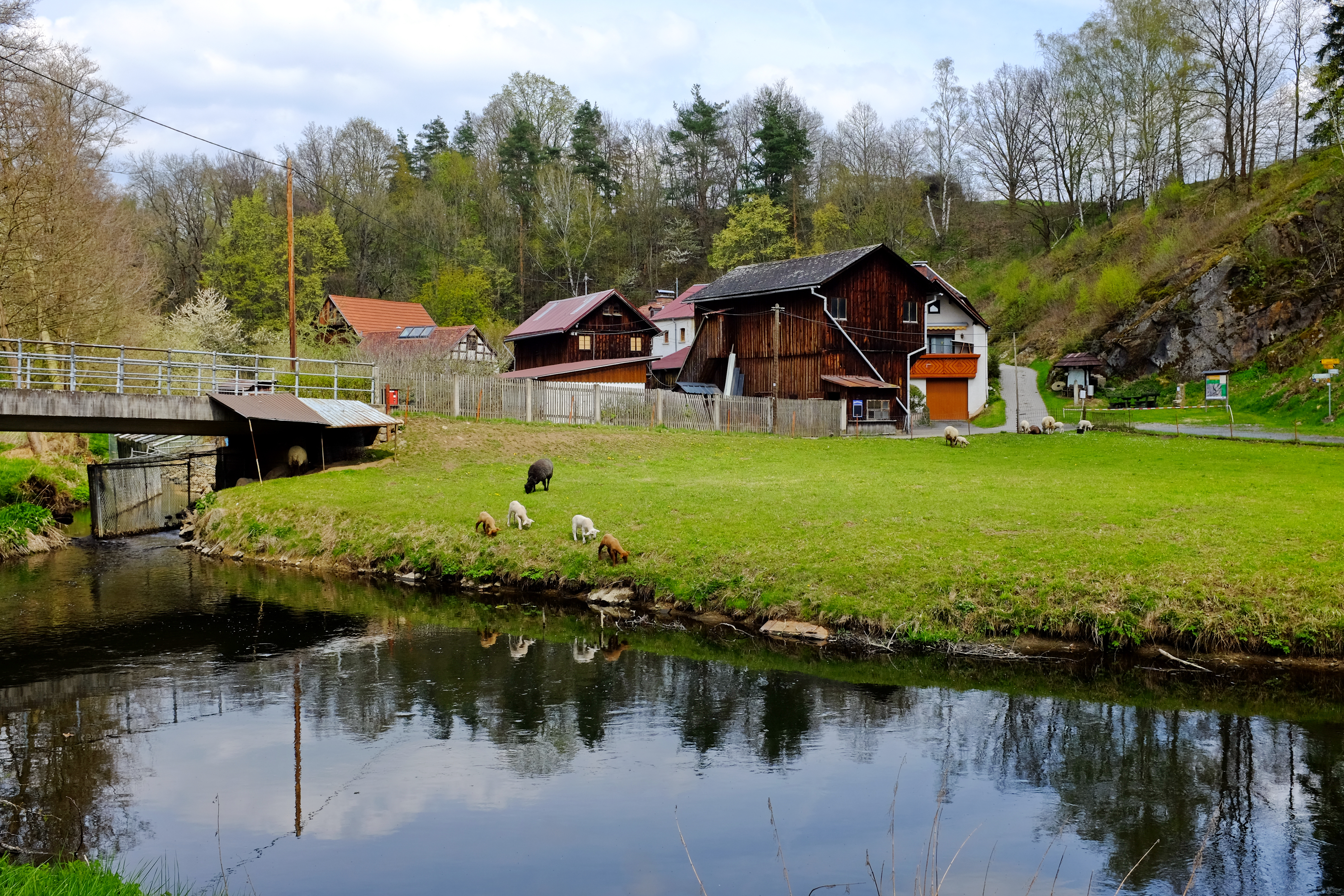 Hohenberg an der Eger, Hammermühle, Zemský okres Wunsiedel im Fichtelgebirge, Horní Franky, Bavorsko